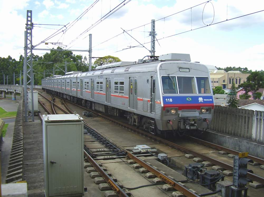 Trensurb